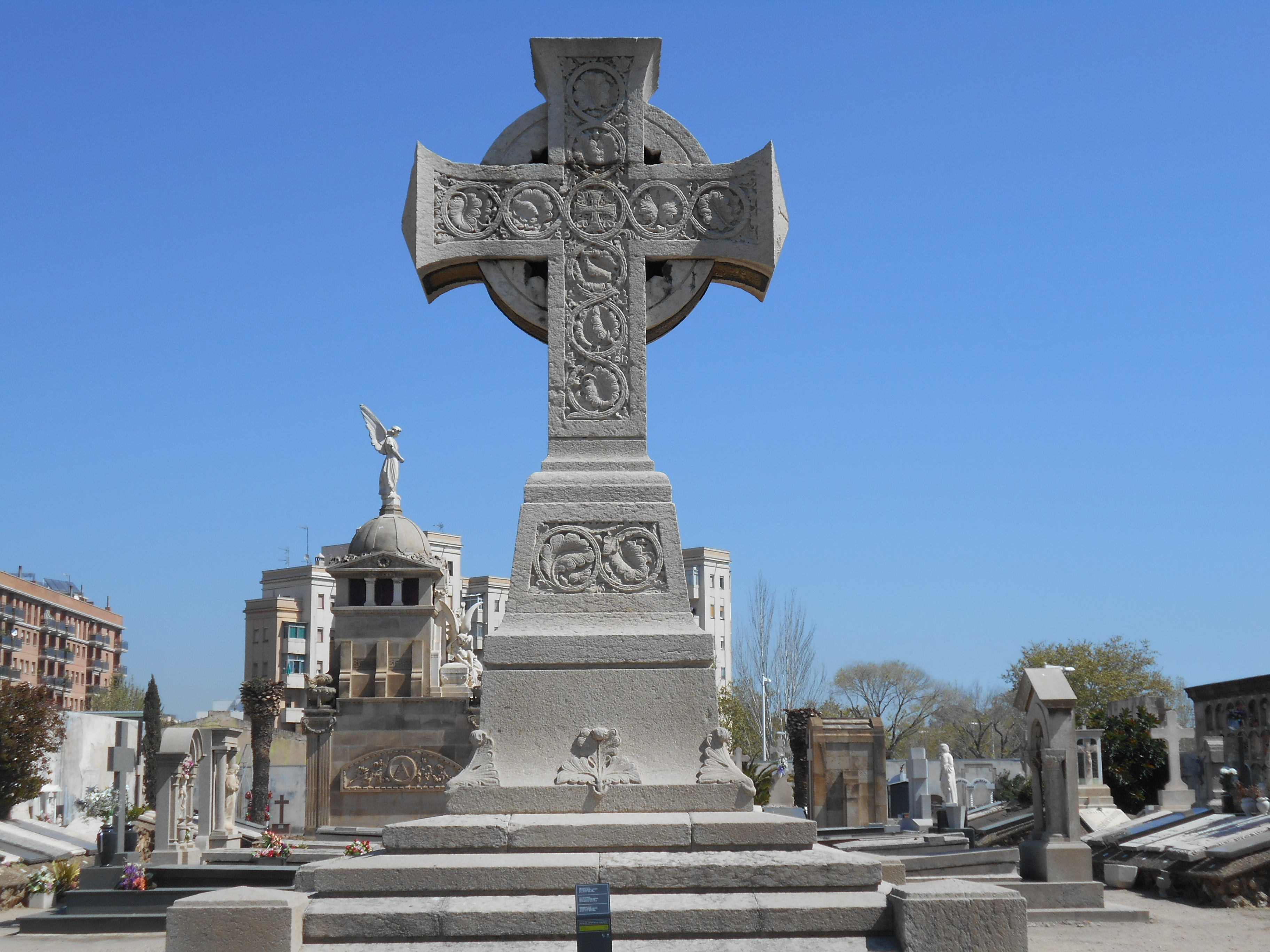 Cruz celta del cementerio de Poblenou, de Leandre Albareda (1888).